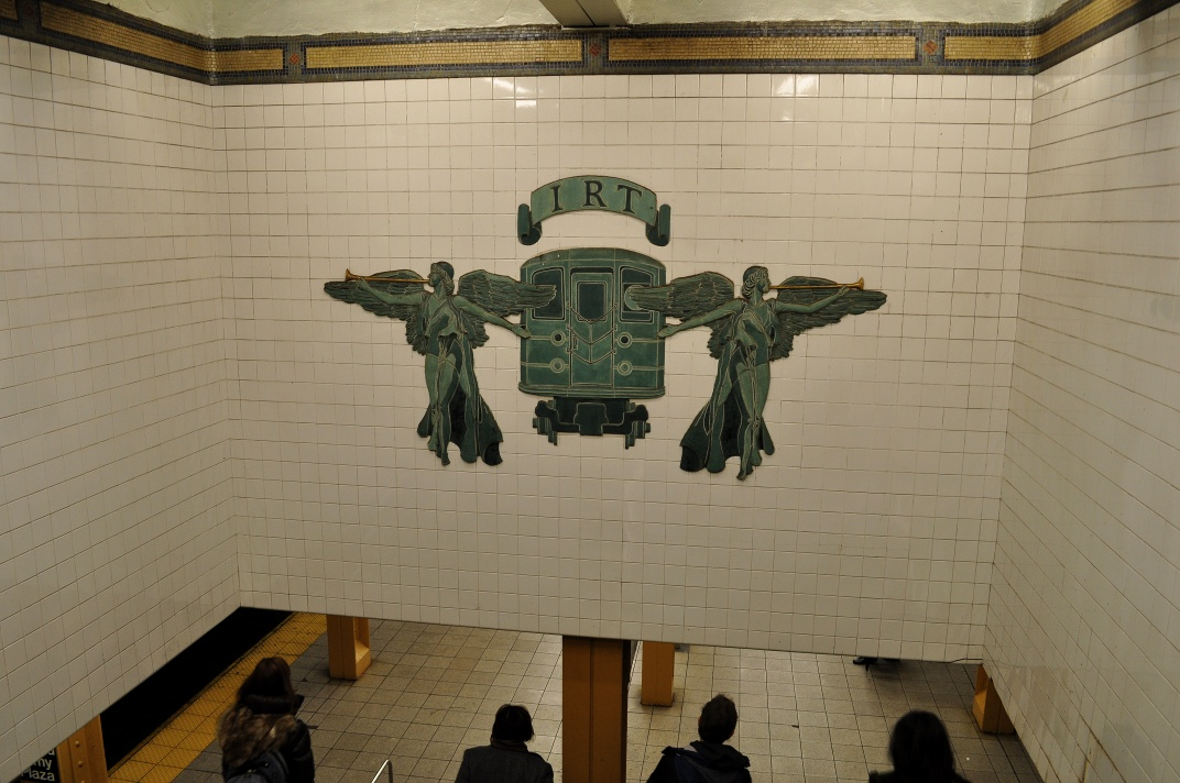 Subway Art